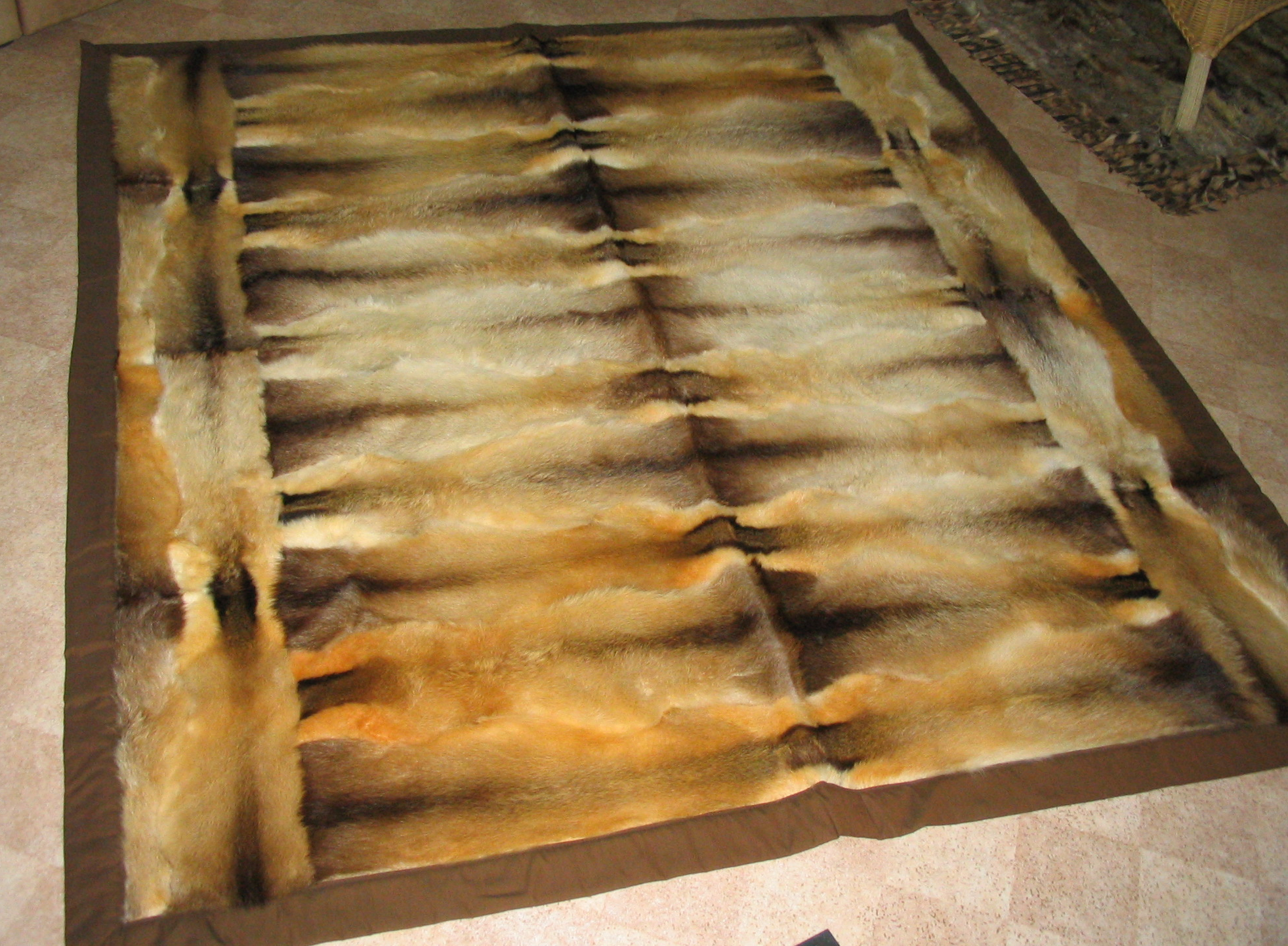 Pahmidecke (Pahmi bzw. Sonnendachs) in seltener Qualität. Gearbeitet ca. 1990. Gesehen bei Karl Friedrich Herhold.